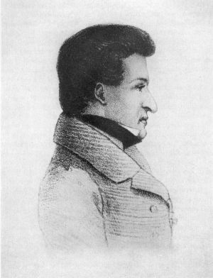 Портрет Жихарева